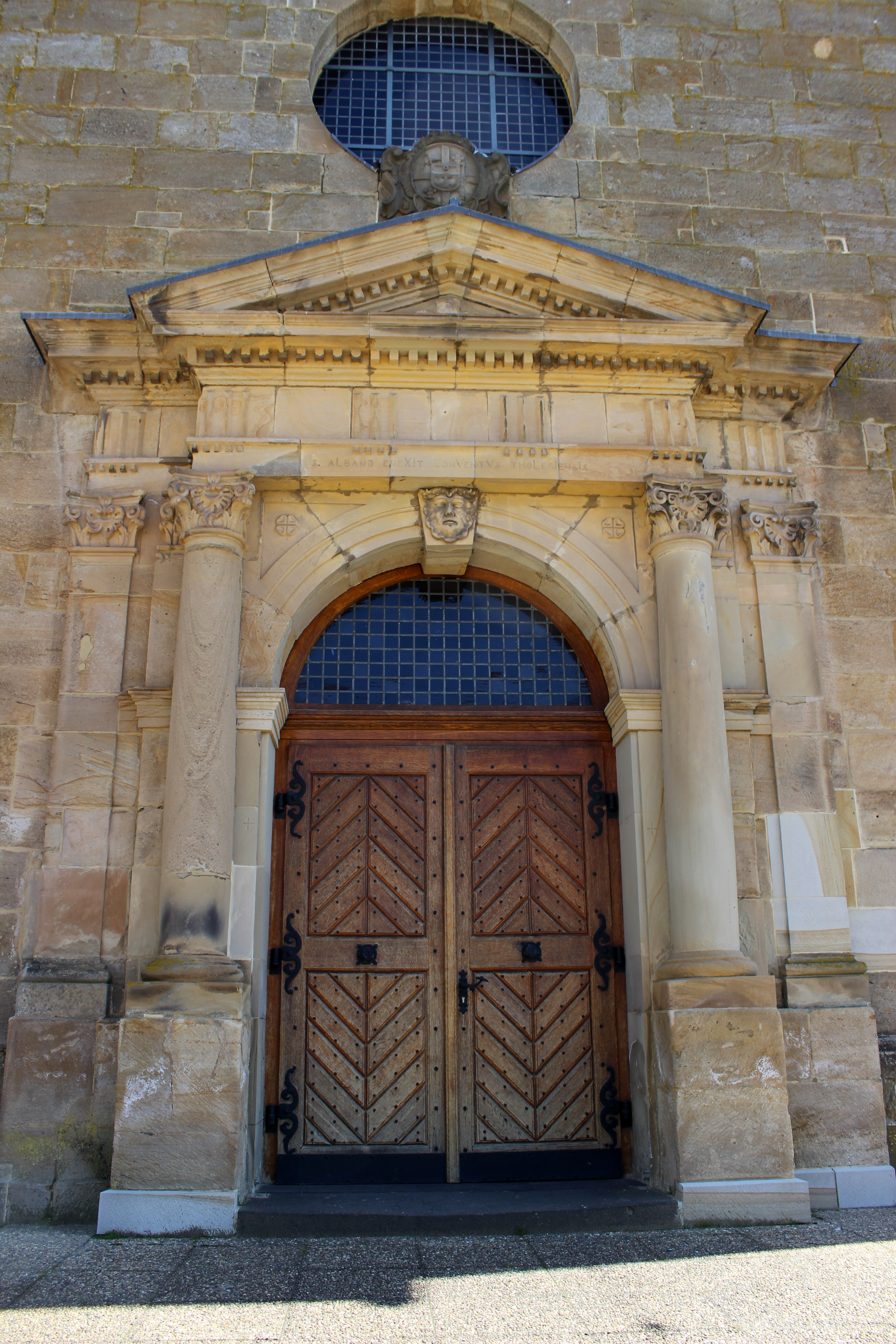 Hauptportal der katholischen Pfarrkirche St. Alban in Thalexweiler, einem Stadtteil von Lebach, Landkreis Saarlouis, Saarland